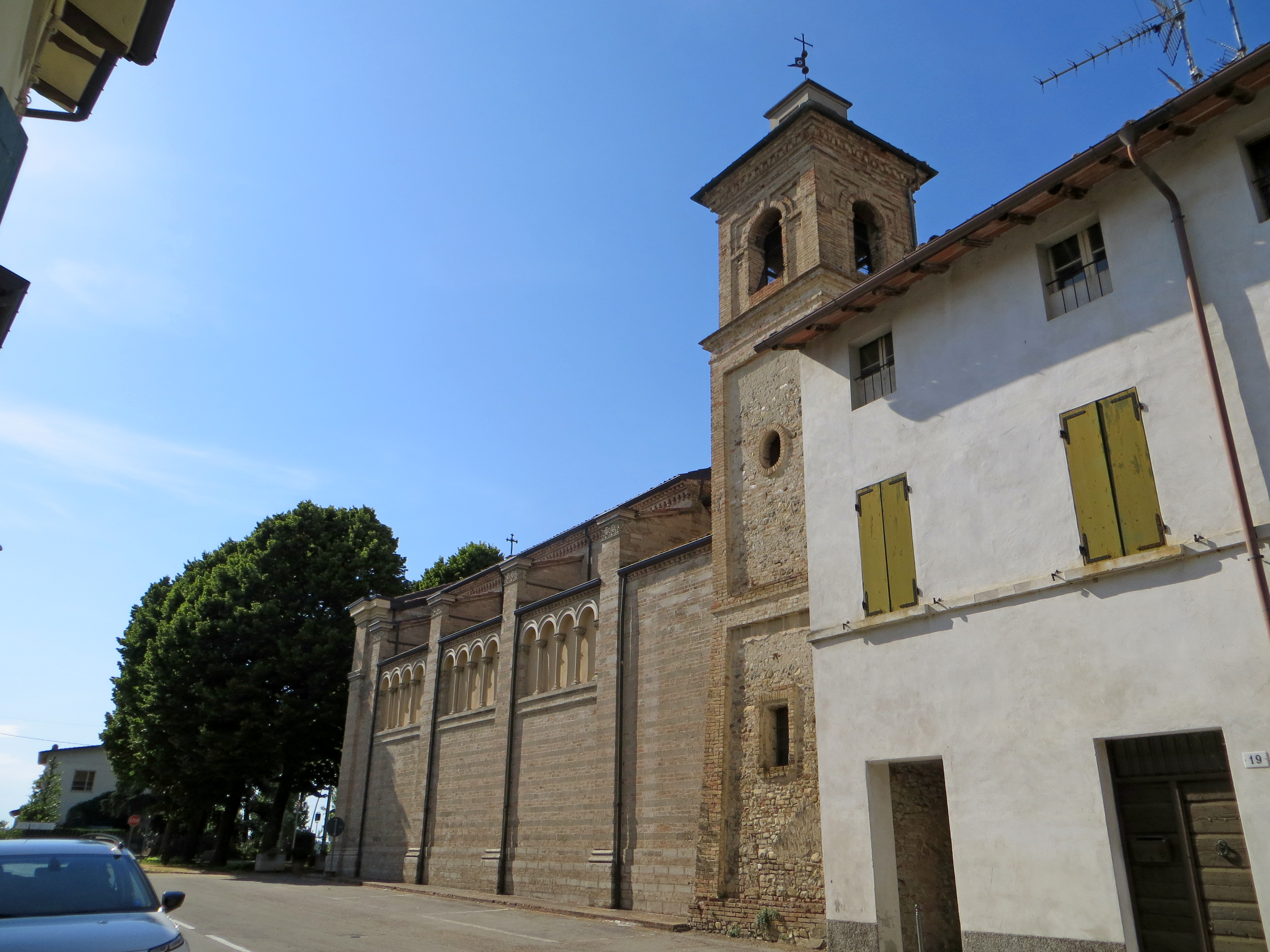 Chiesa di San Quintino (Montechiarugolo) - lato sud